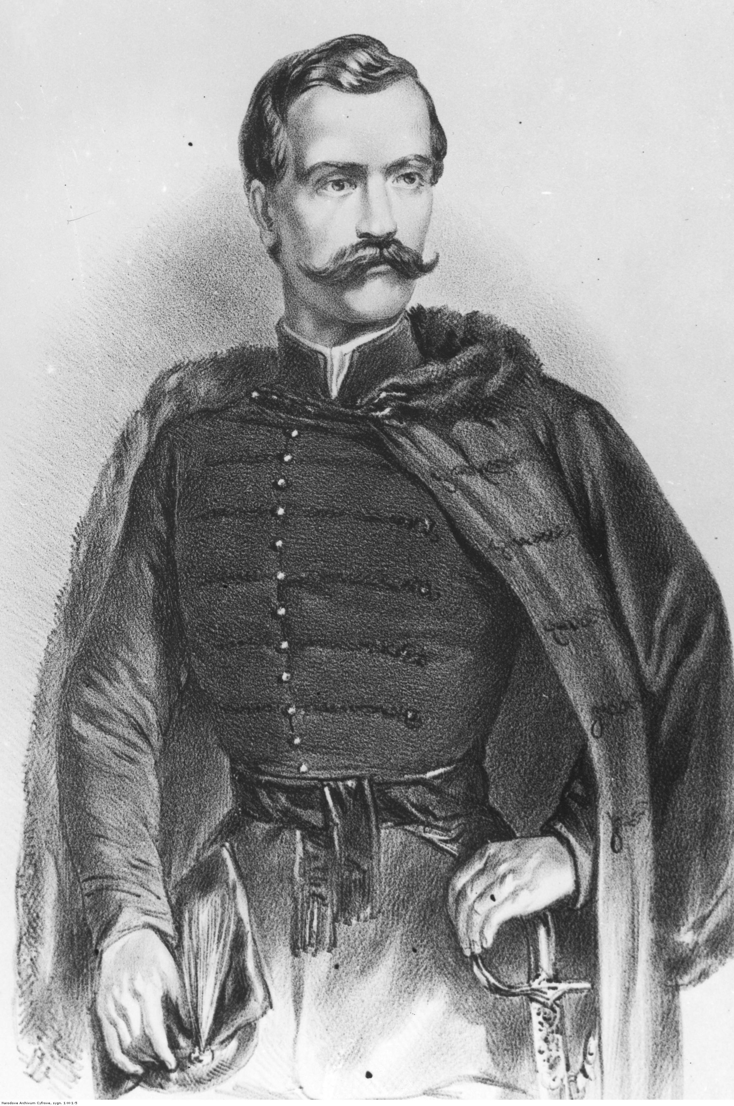 Marian Langiewicz, generał, dyktator powstania styczniowego - reprodukcja portretu. (Koncern Ilustrowany Kurier Codzienny - Archiwum Ilustracji)